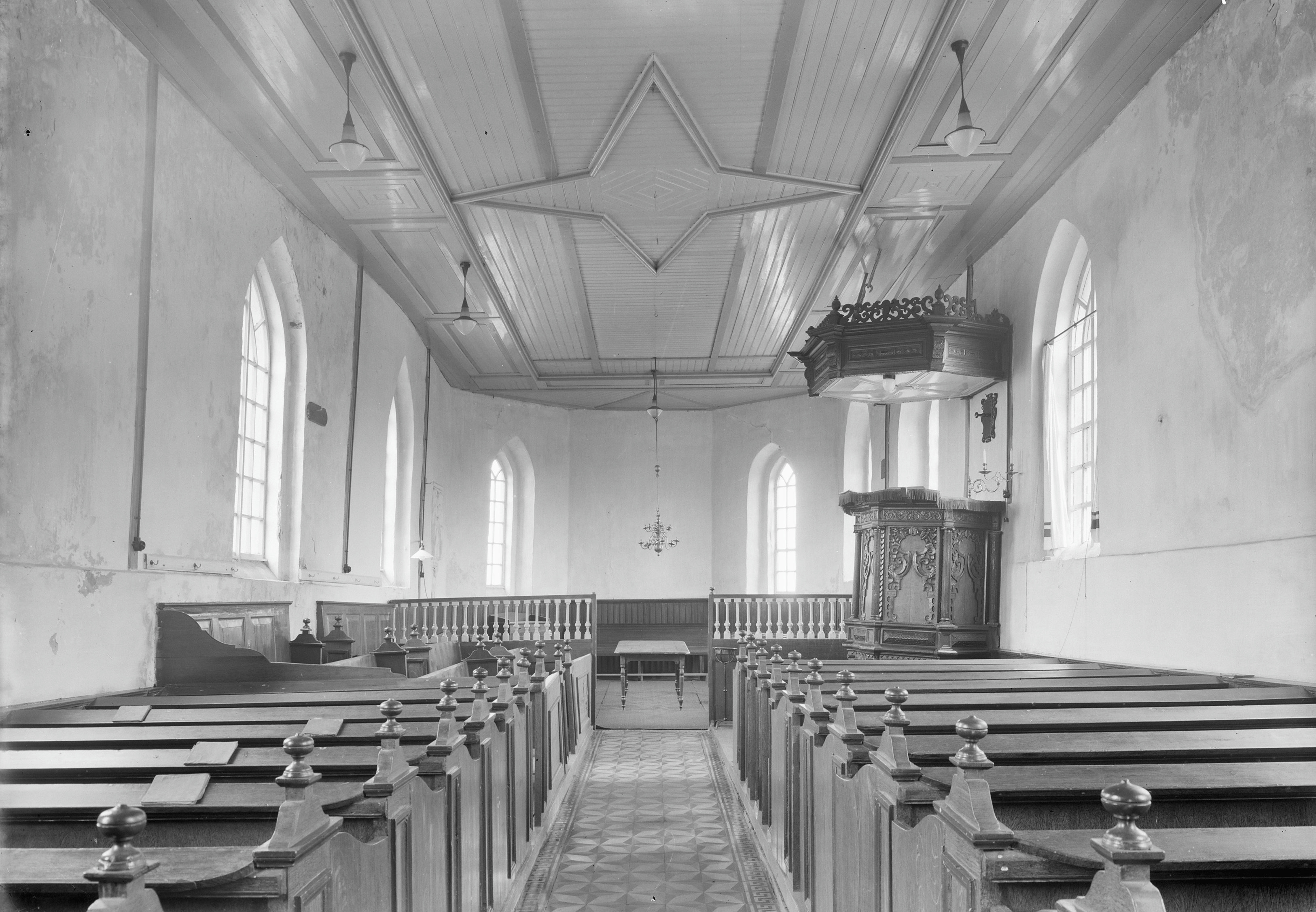 Kerk van Engelbert, gem. Groningen, inwendig naar het oosten, 1942